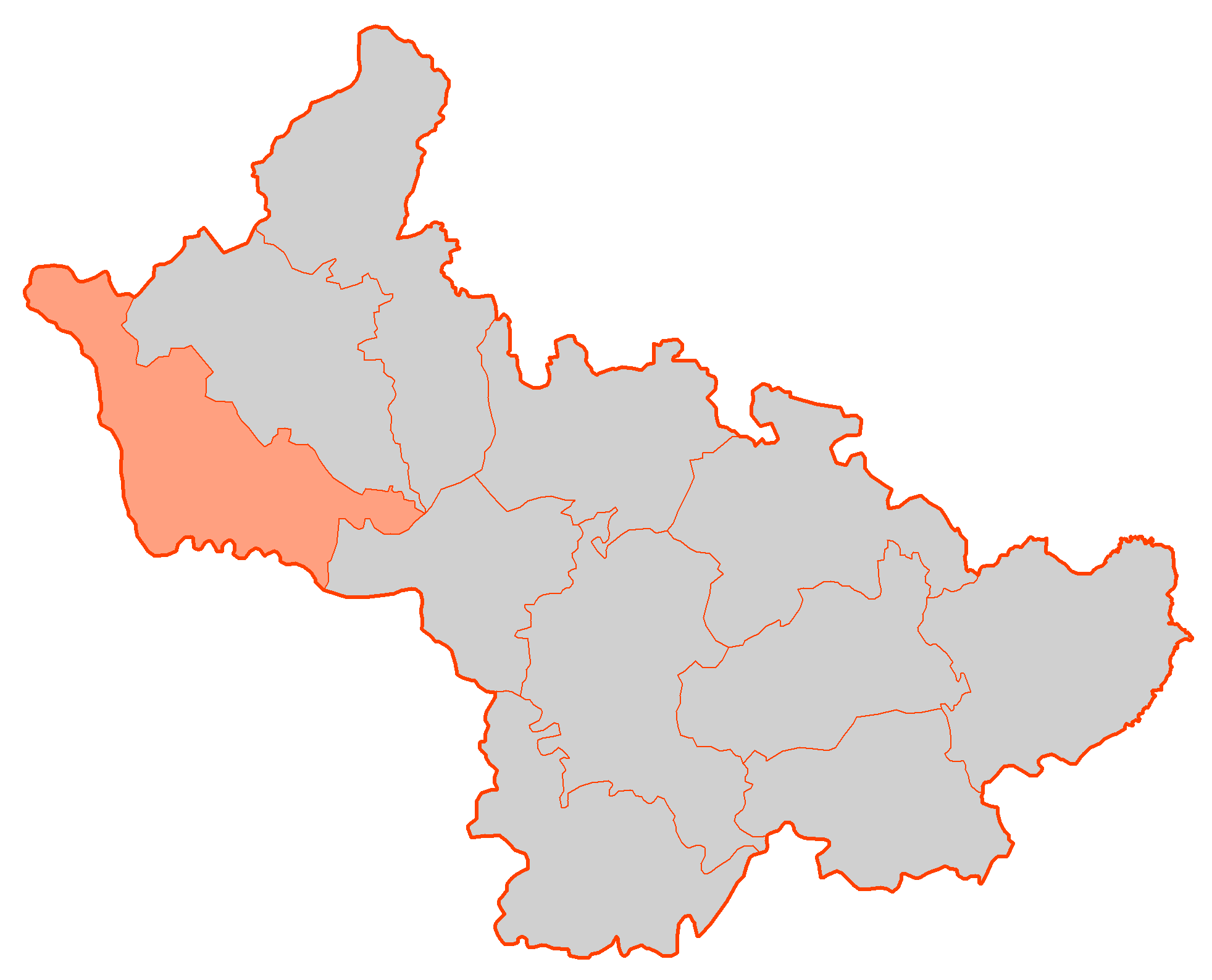 Двинский уезд на карте Витебской губернии